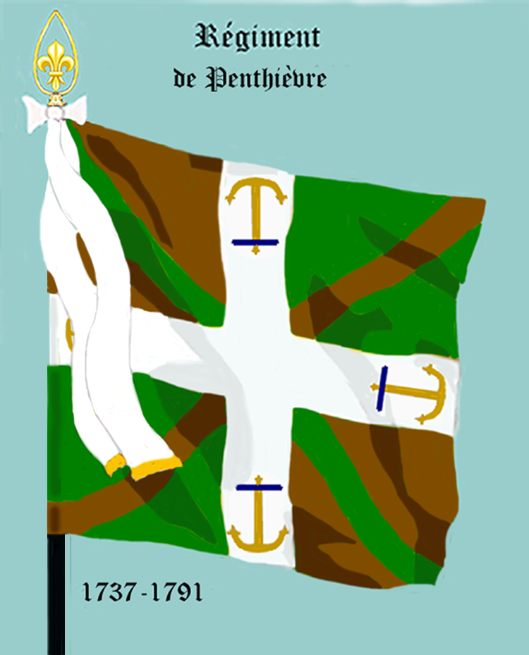 Ordonnanzfahne eines königlich französischen Infanterie-Regiments. - Entnommen und überarbeitet aus: „LES UNIFORMES ET LES DRAPEAUX DE L'ARMÉE DU ROI“ Marseille 1899. (Drapeau d'Ordonnance d' un régiment française d'infanterie royale.)